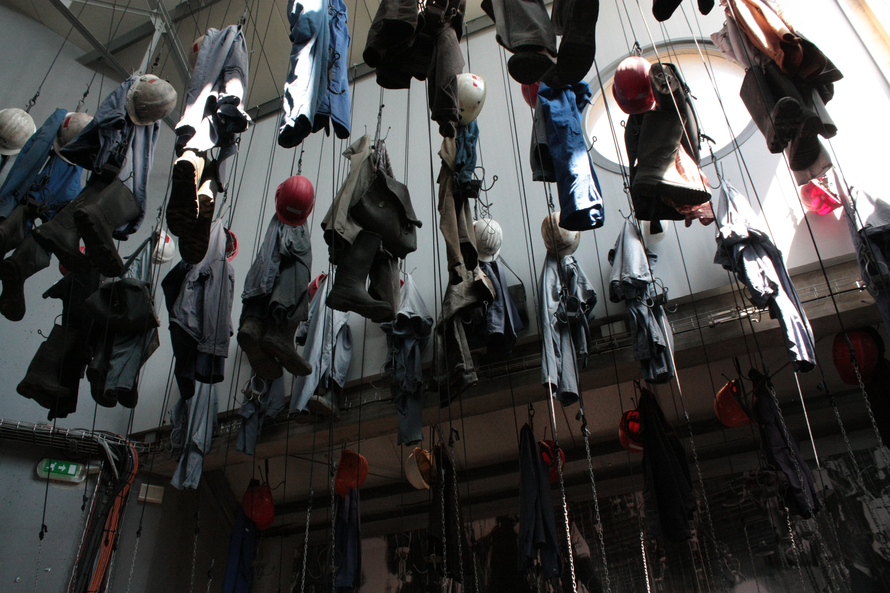 Les tenues des mineurs